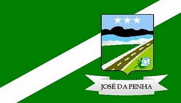 Bandeira do município de José da Penha, Rio Grande do Norte, Brasil.